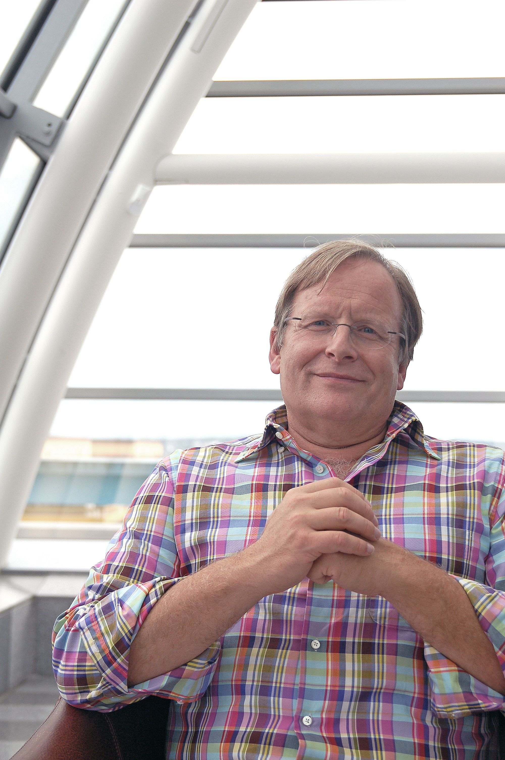 Dietrich Grönemeyer